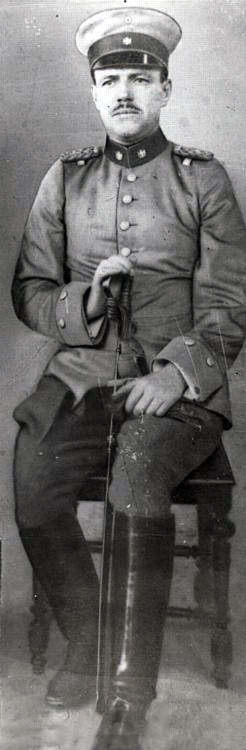 Carlos Ibáñez del Campo, mayor de caballería (1921).